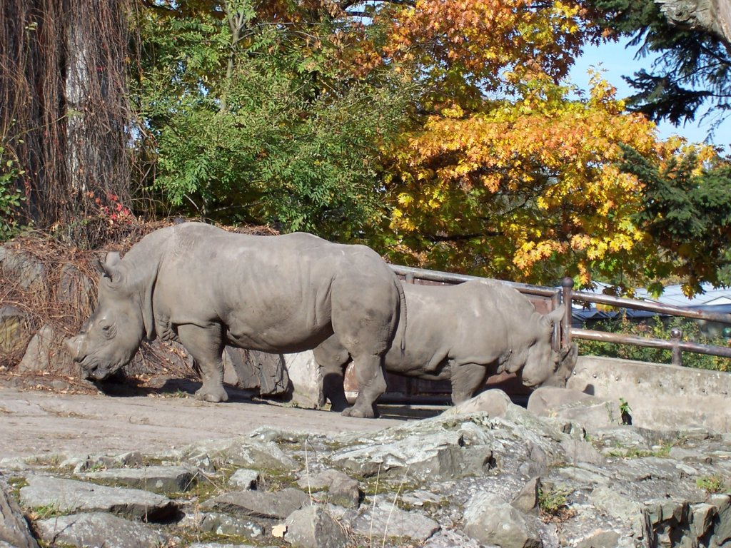 Zoologická zahrada Ostrava, výběh nosorožců.